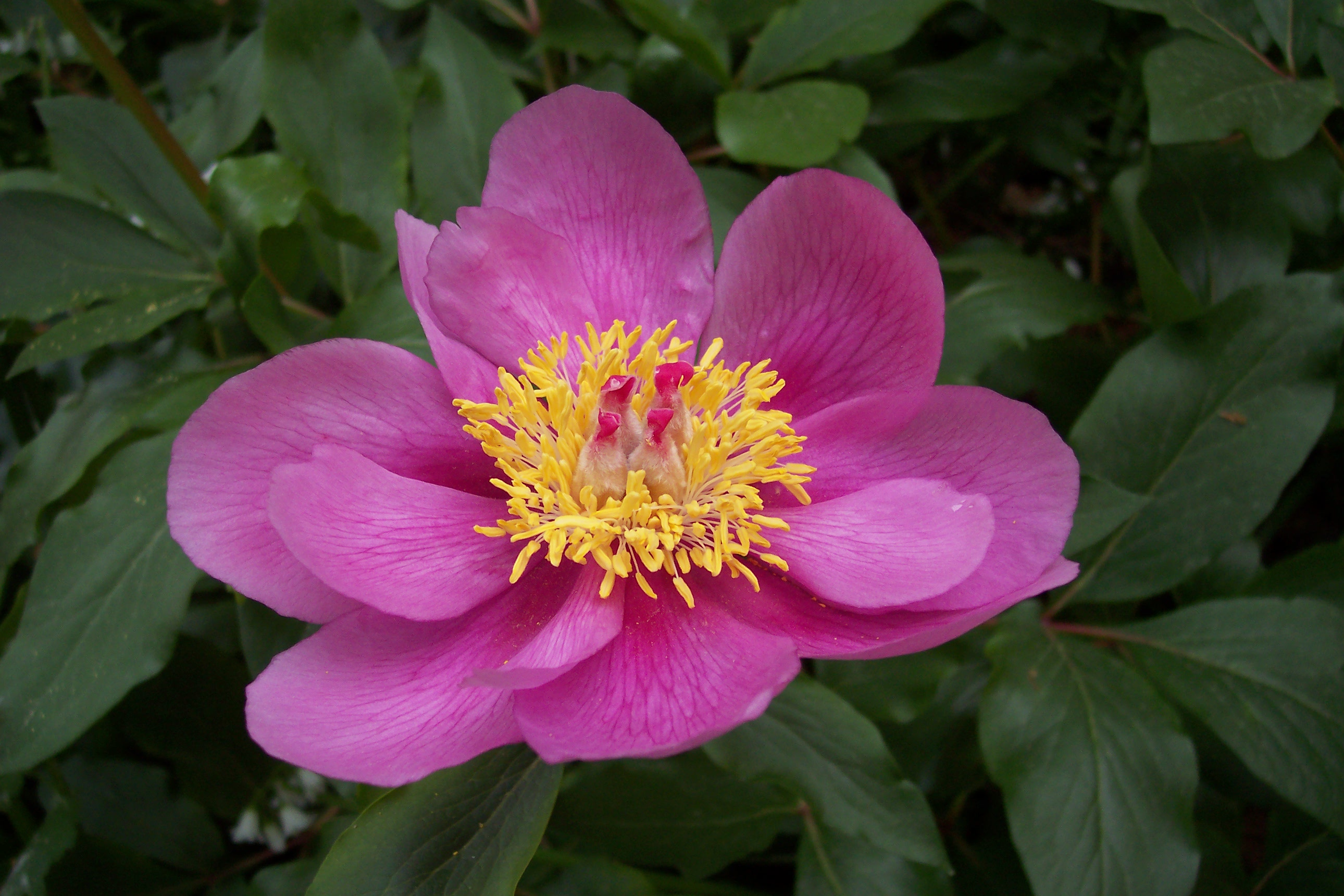 Paeonia broteri. Real Jardín Botánico, Madrid